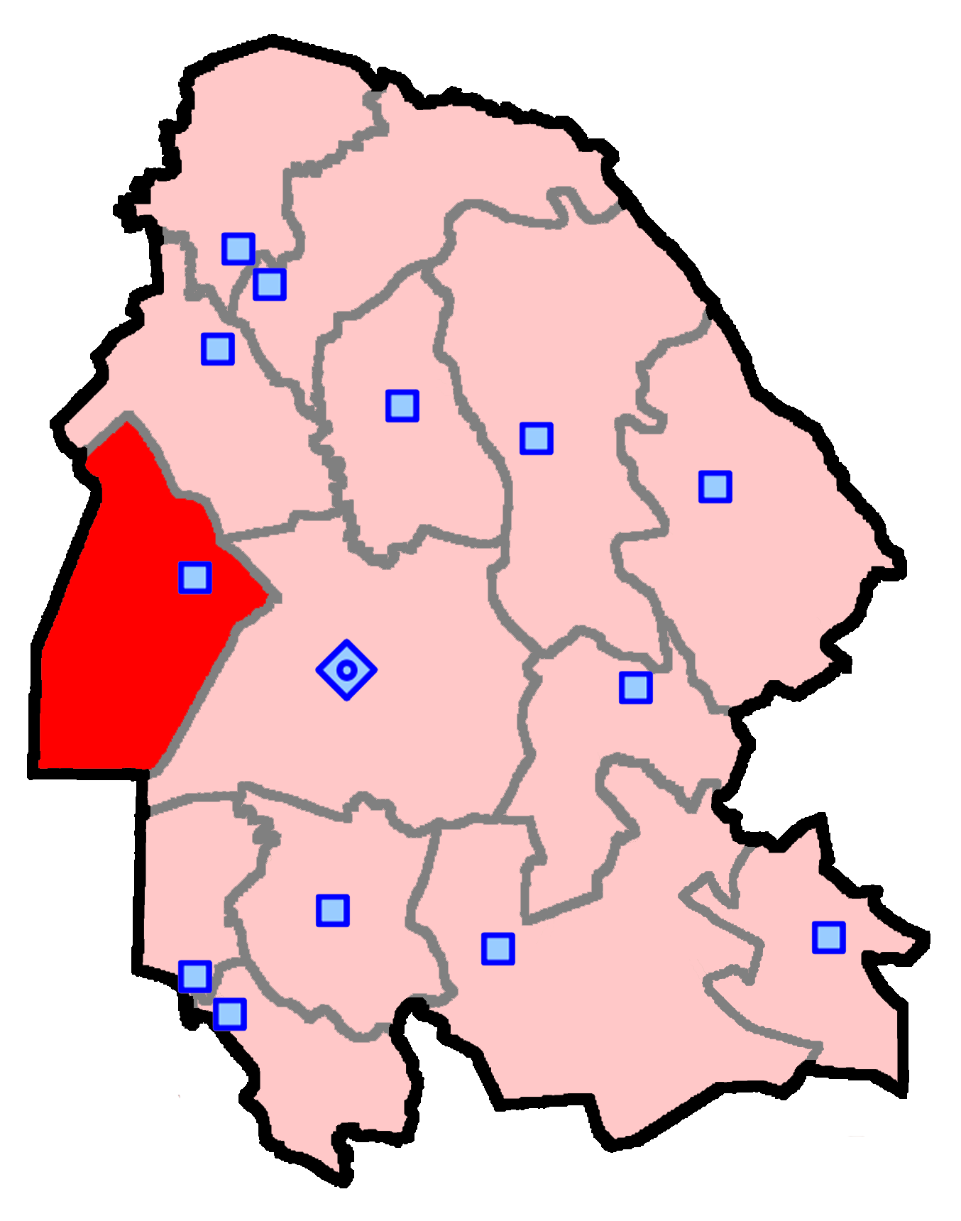 حوزهٔ انتخاباتی دشت‌آزادگان و هویزه برای انتخابات مجلس شورای اسلامی